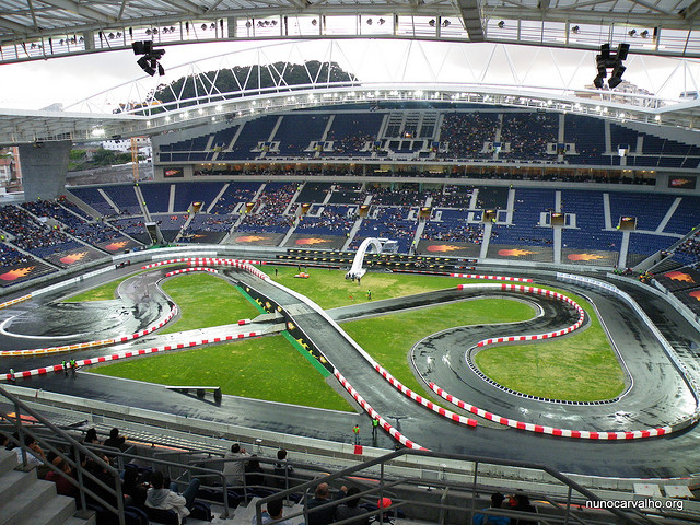 micro machines